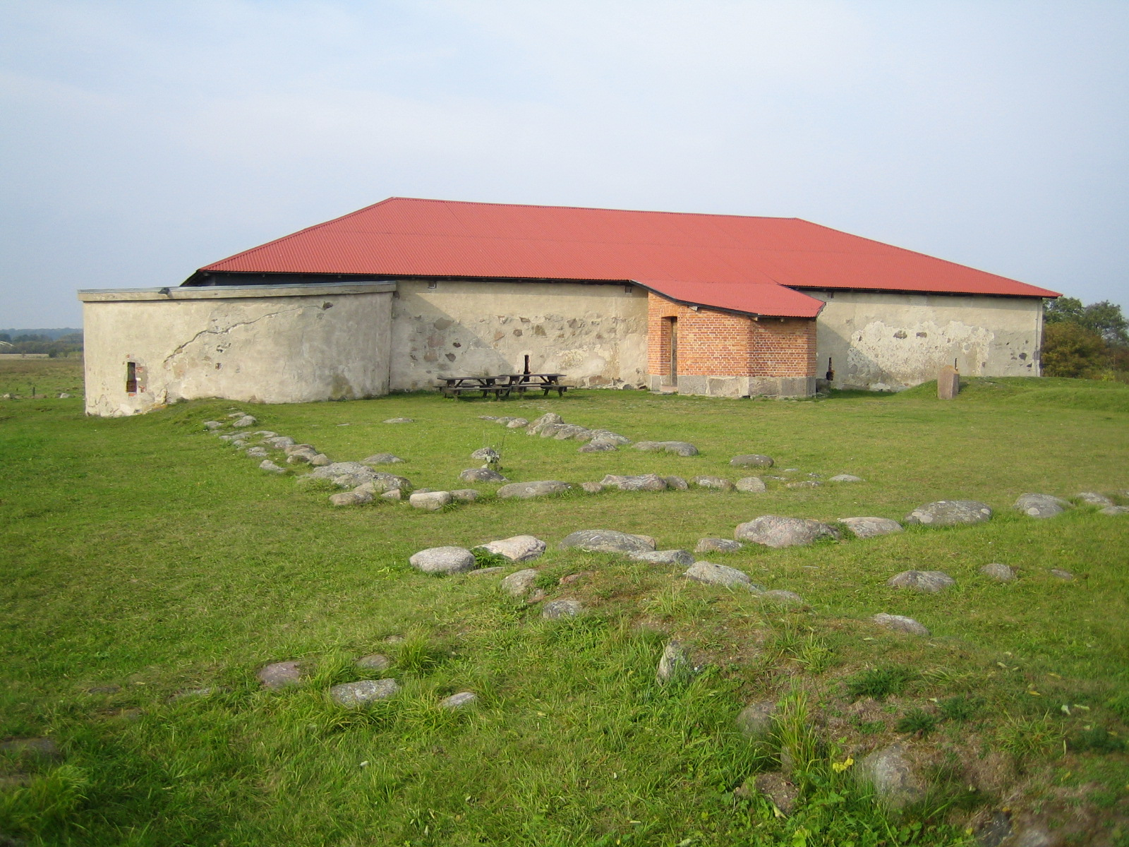 Lillö borgruin vid Kristianstad. Bilden tagen av mig själv 9 oktober 2005.